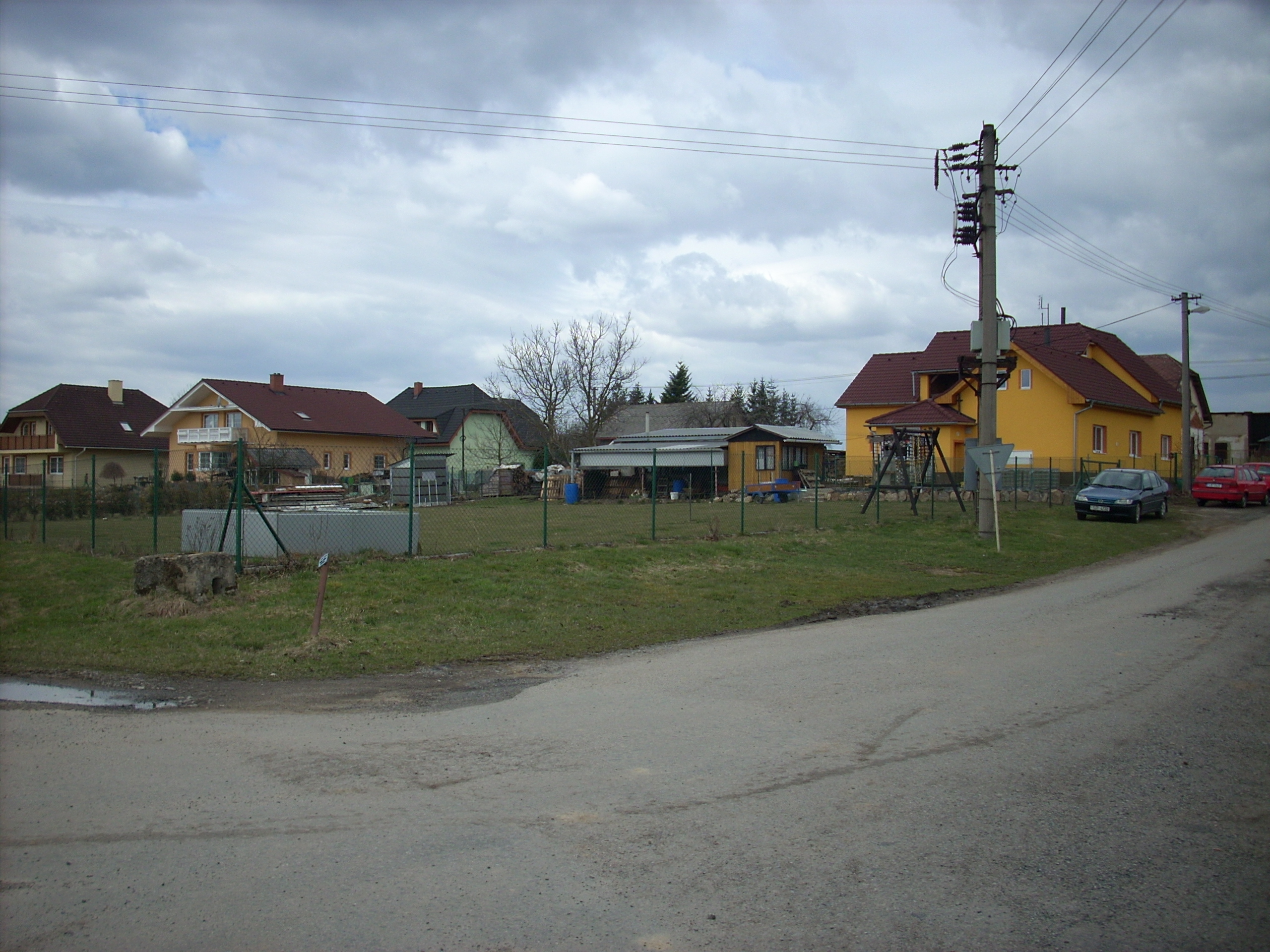 nová výstavba za nádražím, Střítež, okres Jihlava